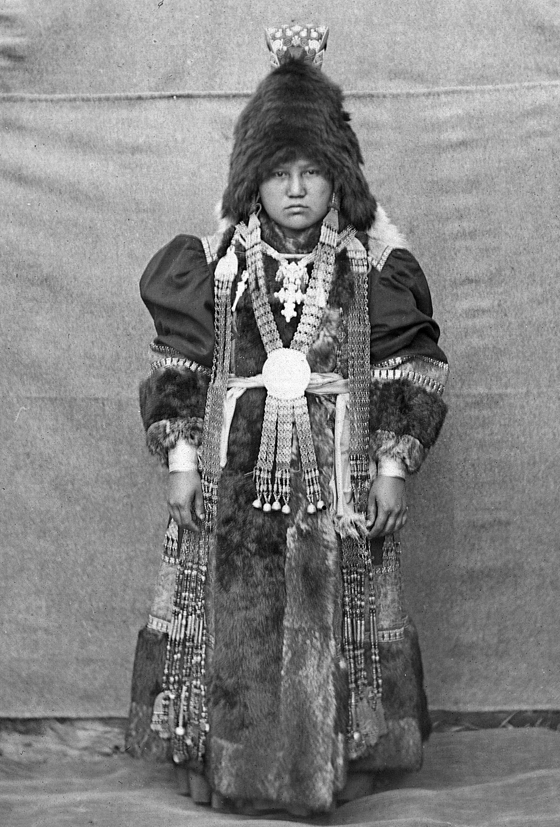 Якутка в праздничном наряде.